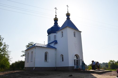 церква у Чубинцях